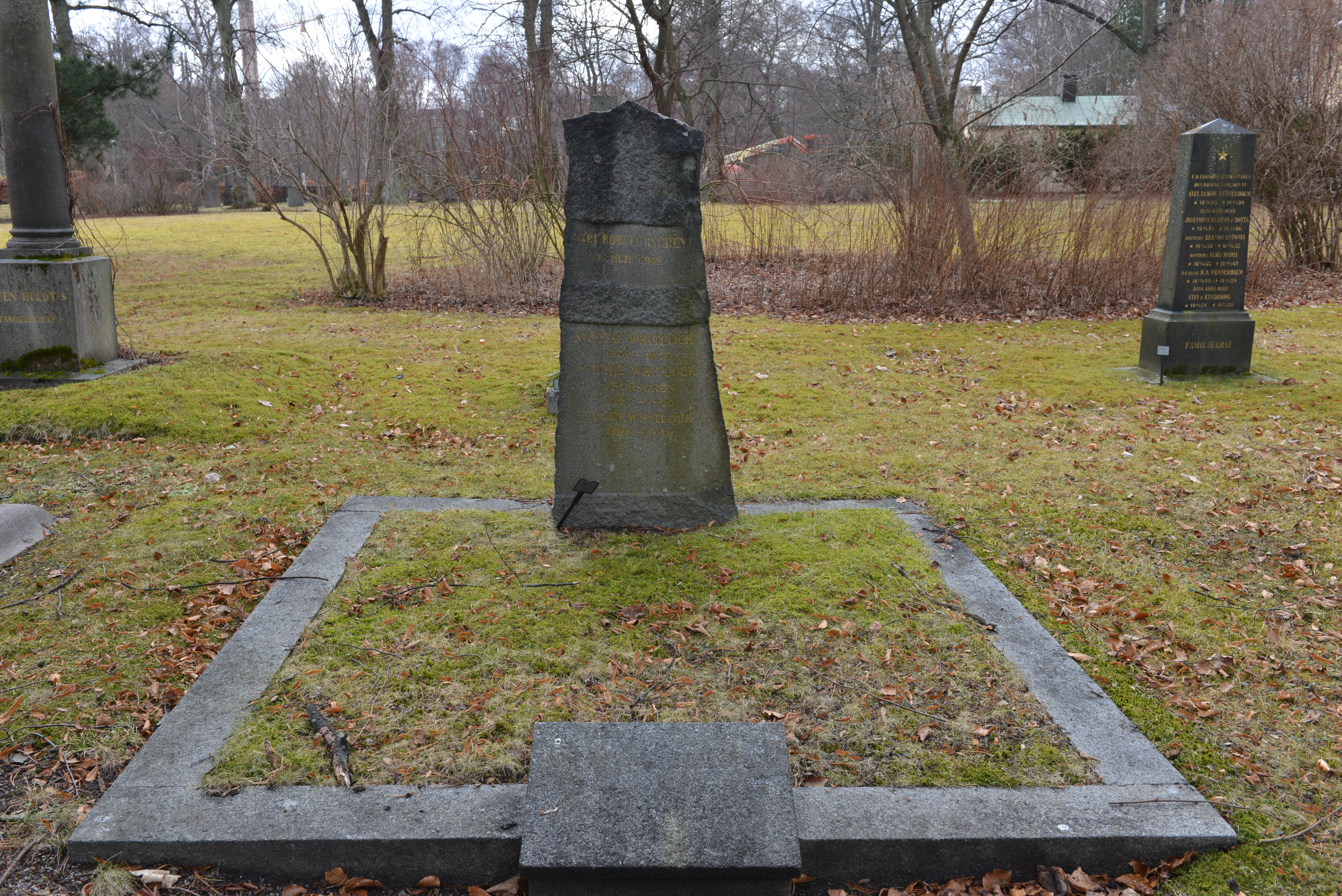 Sophie Whitlocks gravsten på Norra begravningsplatsen.